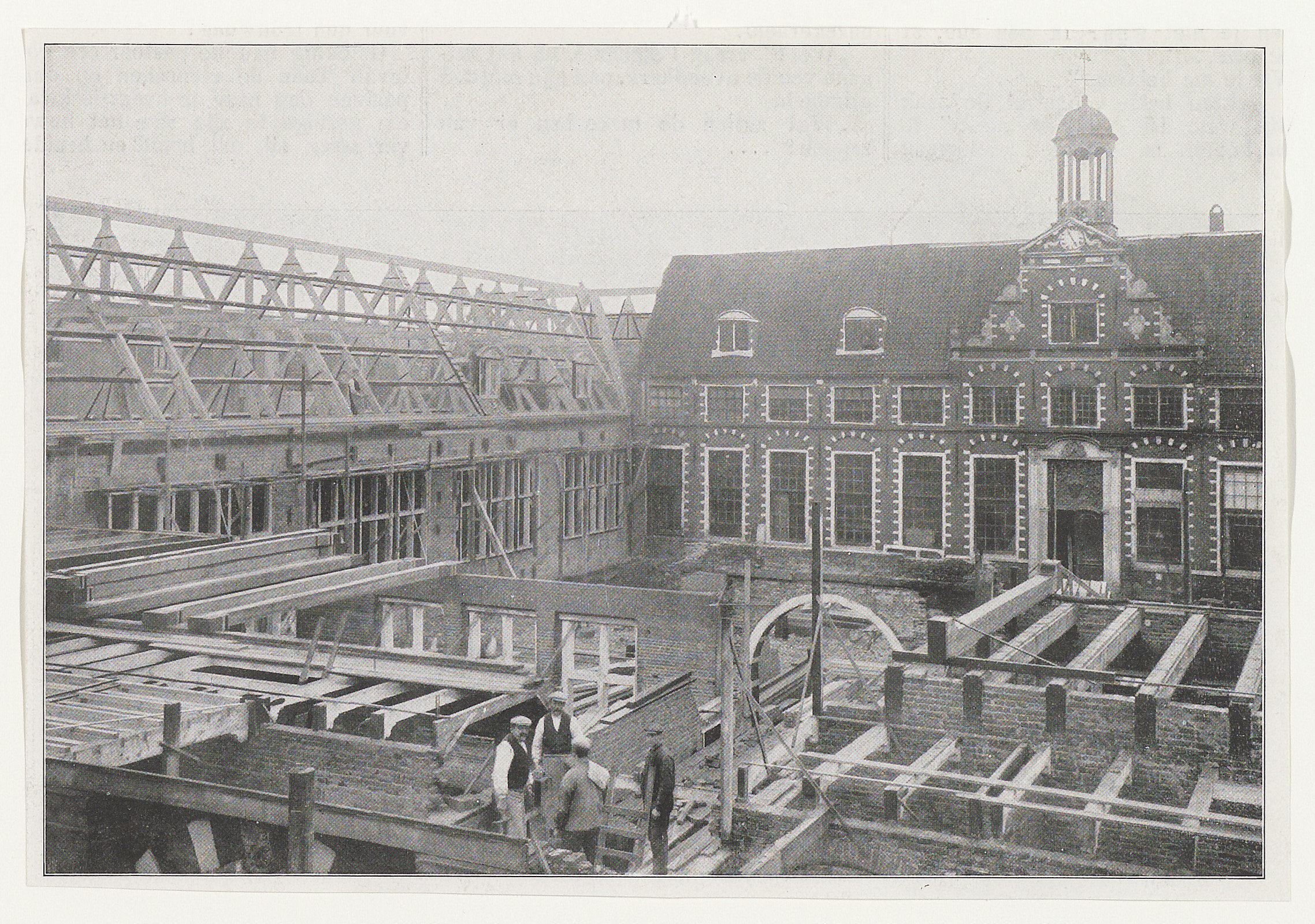 Het Frans Halsmuseum in aanbouw. Op de achtergrond ziet men het hoofdgebouw. Links ziet men de zuidelijke vleugel. Op de voorgrond ziet men een boog met zandsteenversiering, de grote poort, waarvan een deel is blijven staan.